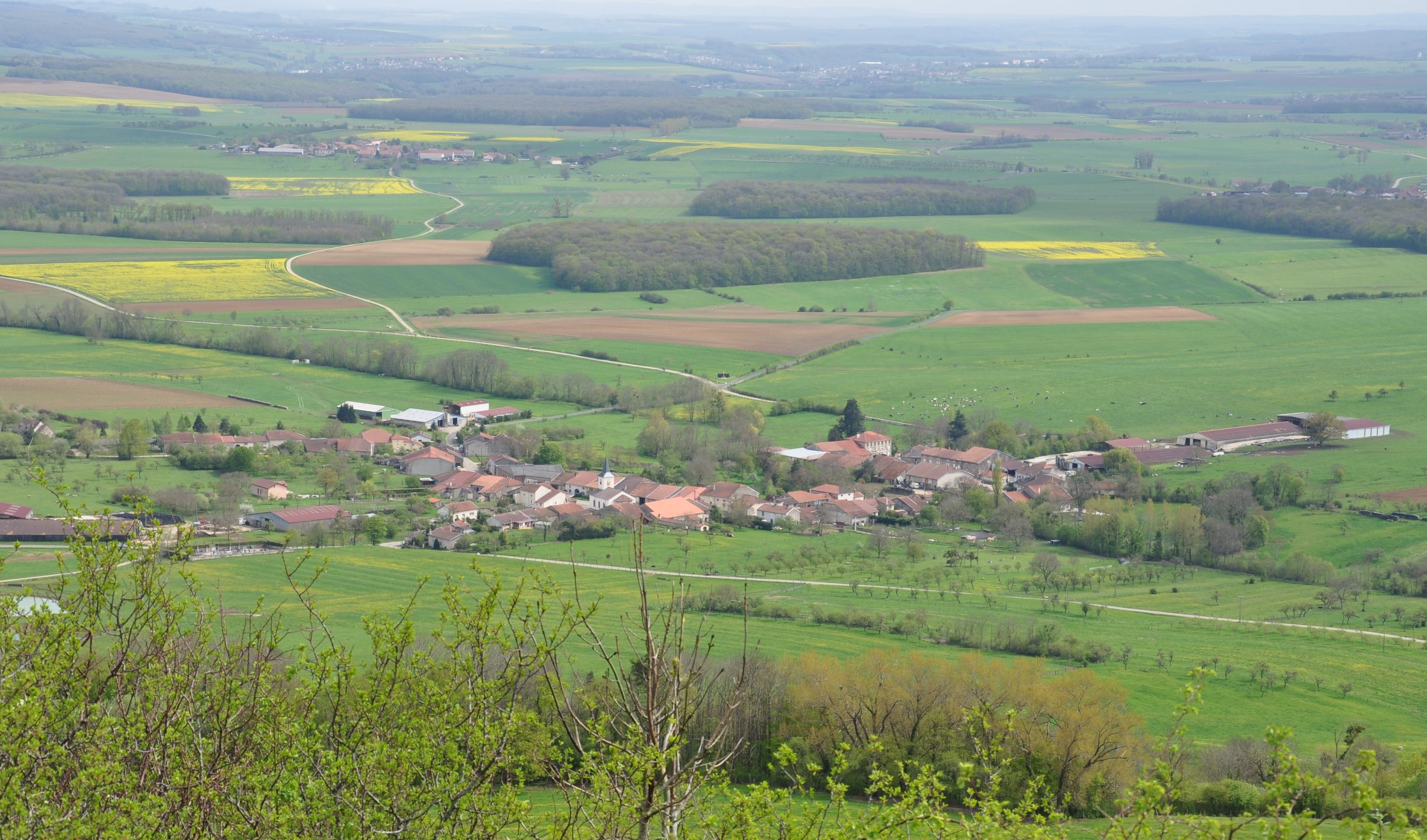 Le village de Forcelles-sous-Gugney en Lorraine